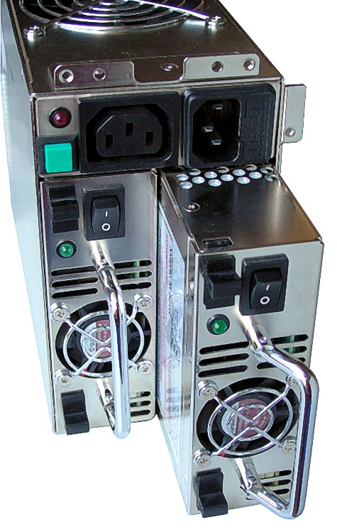 Ein redundantes PC-Netzteil zur Montage in einem 19"-Gehäuse, einer der beiden Einschübe halb herausgezogen. Die Baugröße entspricht einem Standard-ATX-Netzteil Quelle: Eigenes Foto Fotograf/Zeichner: Smial Datum: 10.05.2006